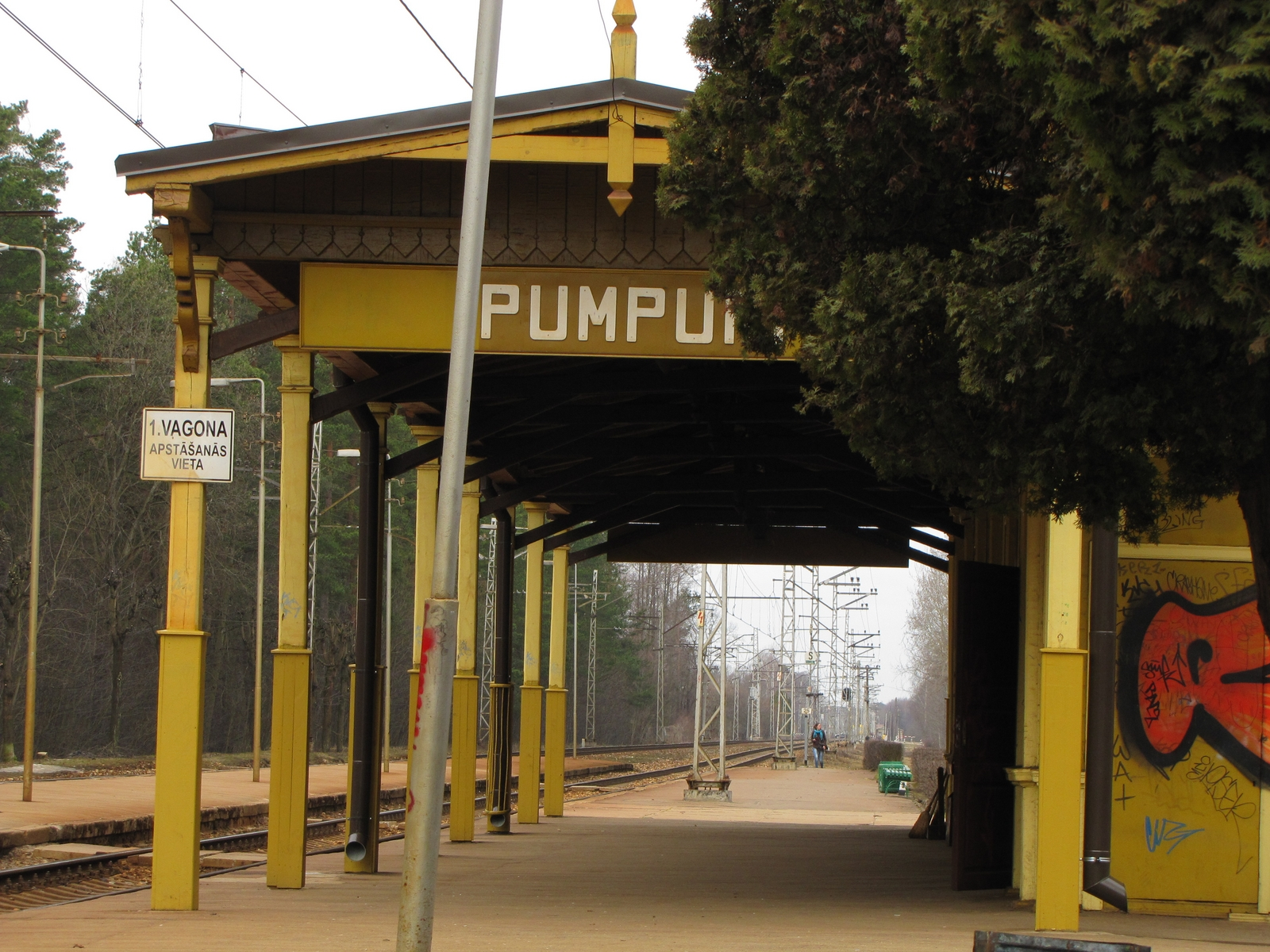 pumpuri